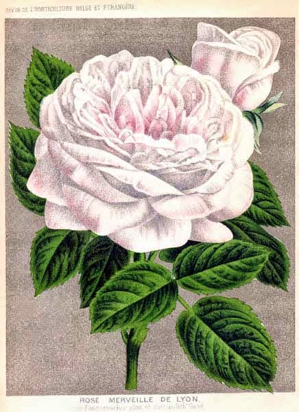 Rose 'Merveille de Lyon' (Pernet père, 1882), hybride remontant. Chromolithographie parue en 1886 dans la Revue de l'horticulture belge et étrangère , Gand, tome XII, pl. 15.